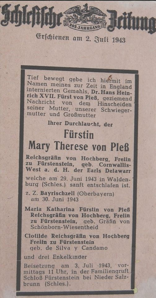 Nekrolog księżnej Daisy opublikowany w "Schlesische Zeitung" 2 lipca 1943 r. Dzięki uprzejmości Bronisławy Jeske-Cybulskiej